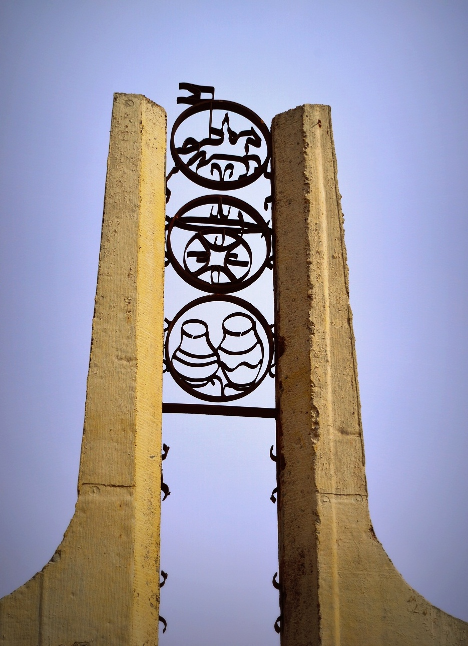 Иволгинское городище. Бурятия, Улан-Удэ